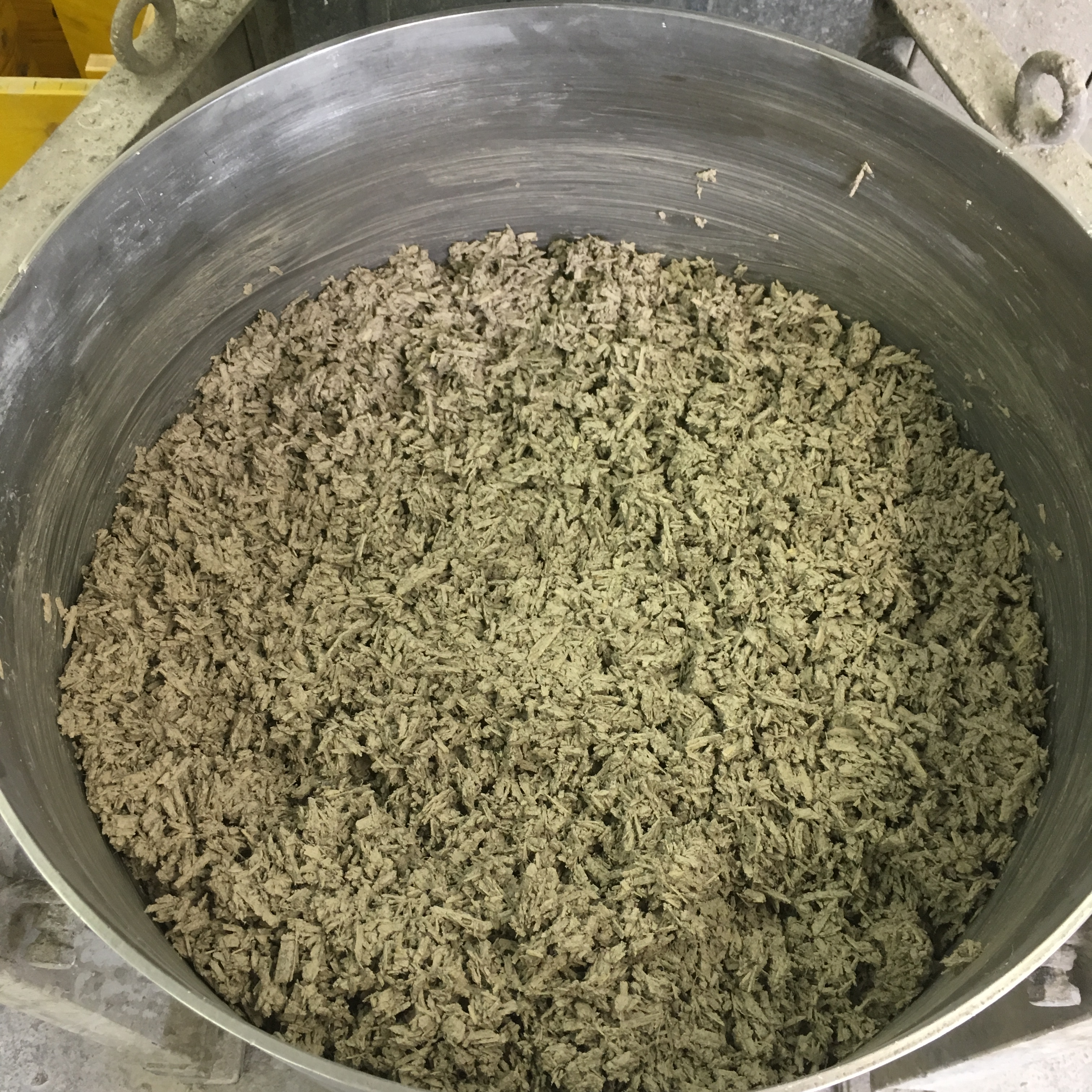 Die Hanfschäben werden zunächst vorgenässt. Anschliessend wird das Bindemittel dazugegeben. Dadurch ummantelt das Bindemittel gleichmäßig die Schäben und eine homogenisierte Maße entsteht. Zum Schluss wird noch ein zusätzlicher Wasseranteil zum hydratisieren des Bindemittels dazugegeben.